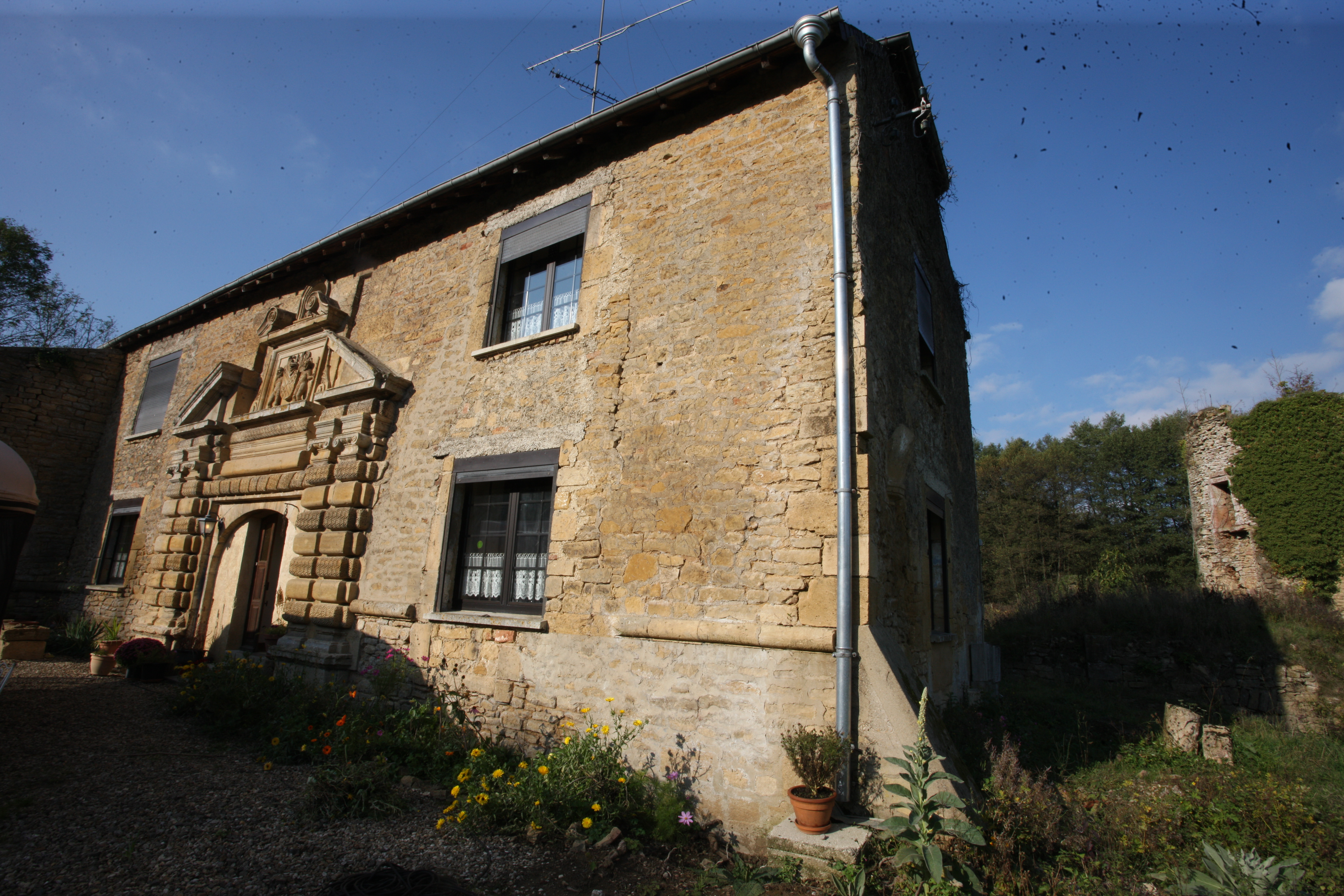 Château d'Auflance, (Inscrit, 1991) .